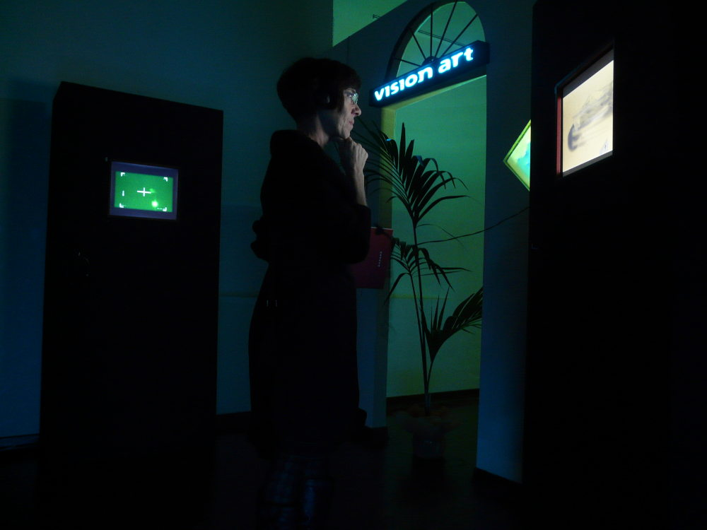 La mostra di videoarte denominata Vision Art